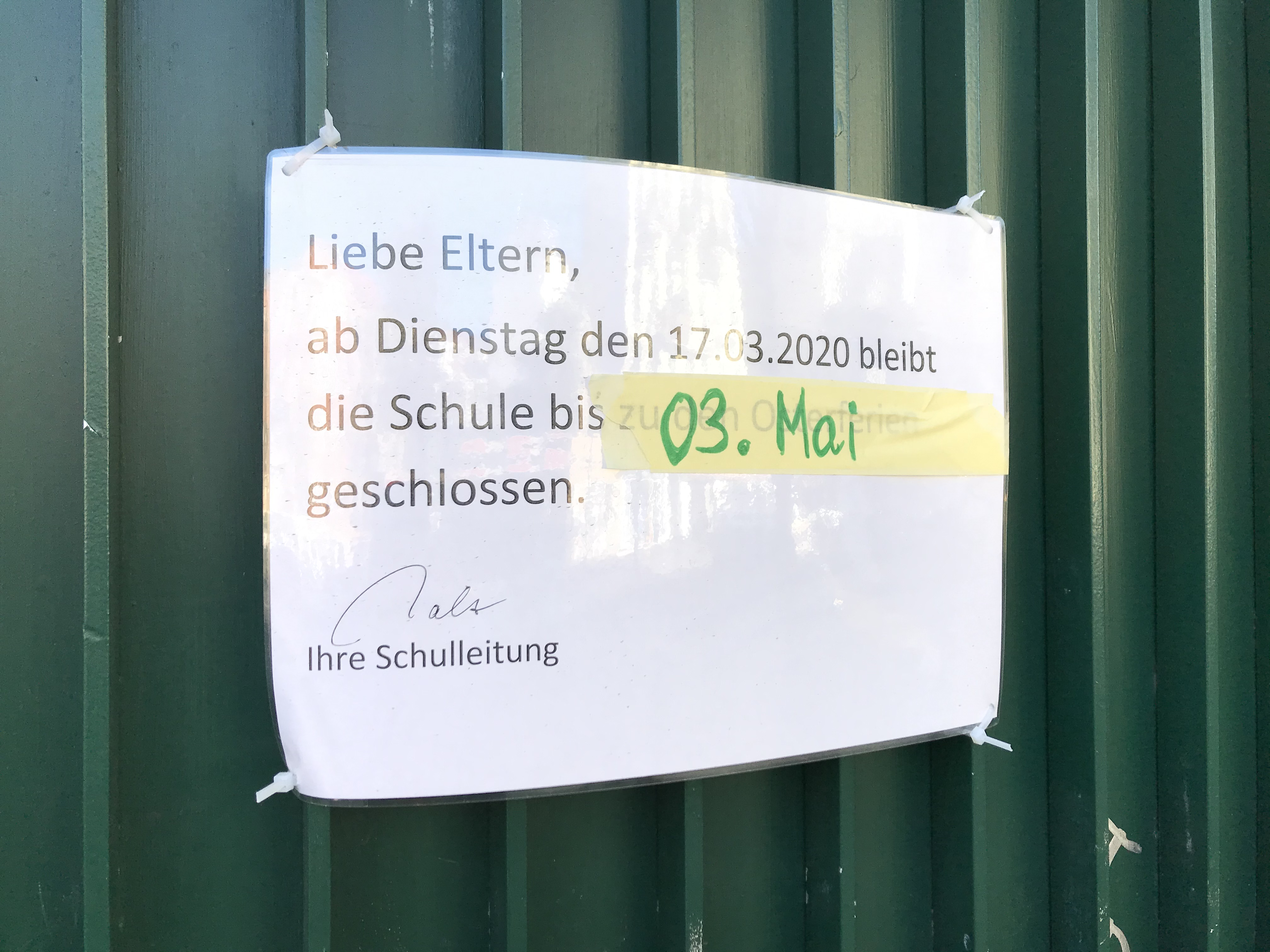 Hinweisschild an einem Schultor bezüglich Schulschließung in Zusammenhang mit der Corona-Pandemie. Gesehen in Berlin.